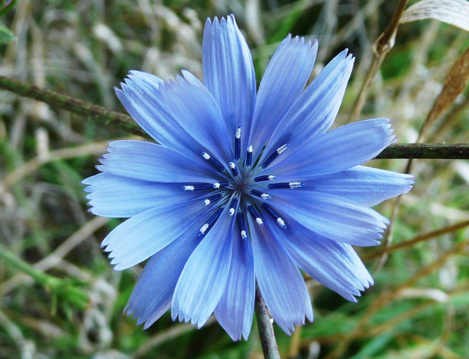 Fleur de chicorée (Cichorium intybus)